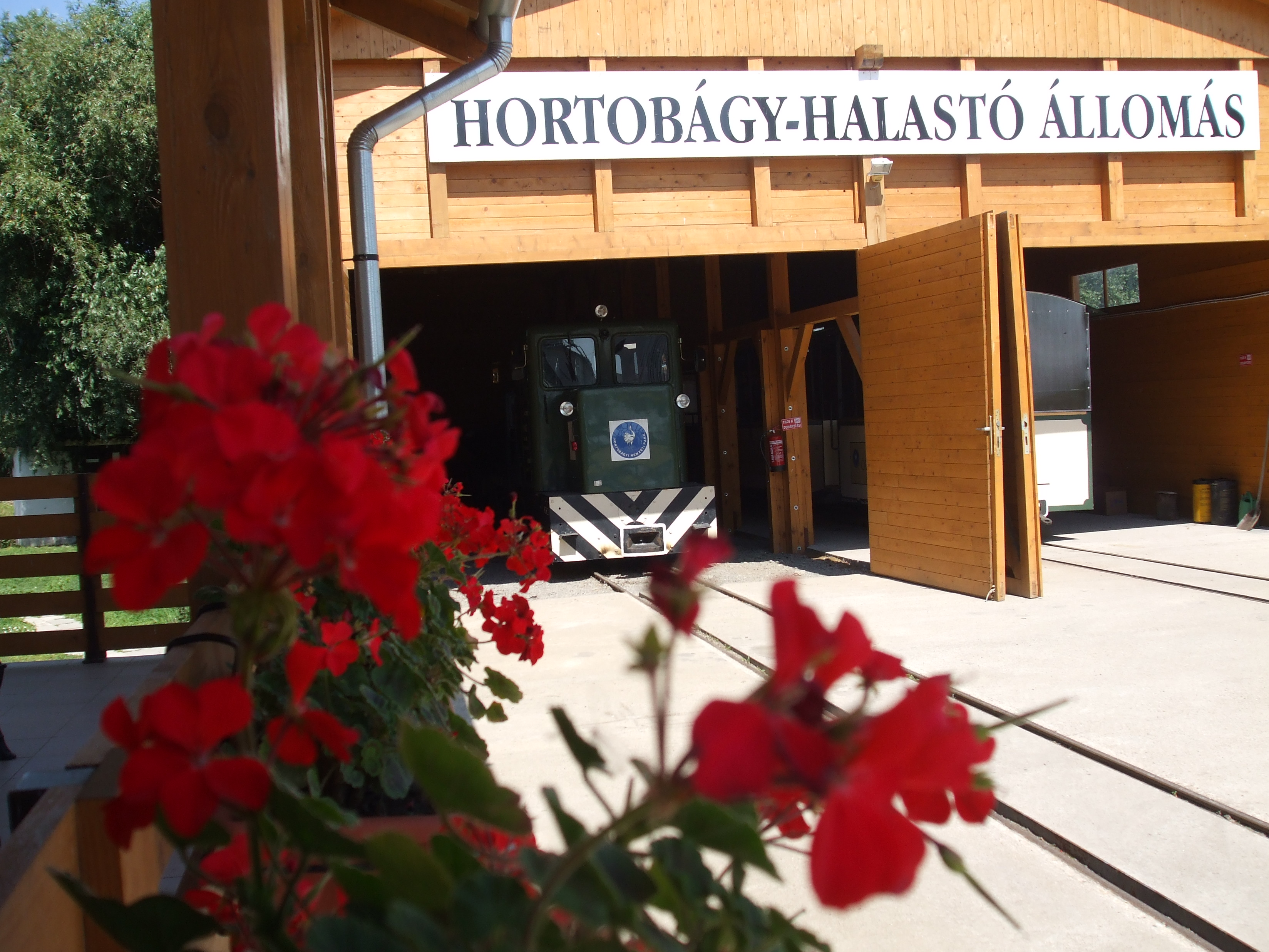 A Hortobágyi Kisvasút fűtőháza C–50-es mozdonnyal